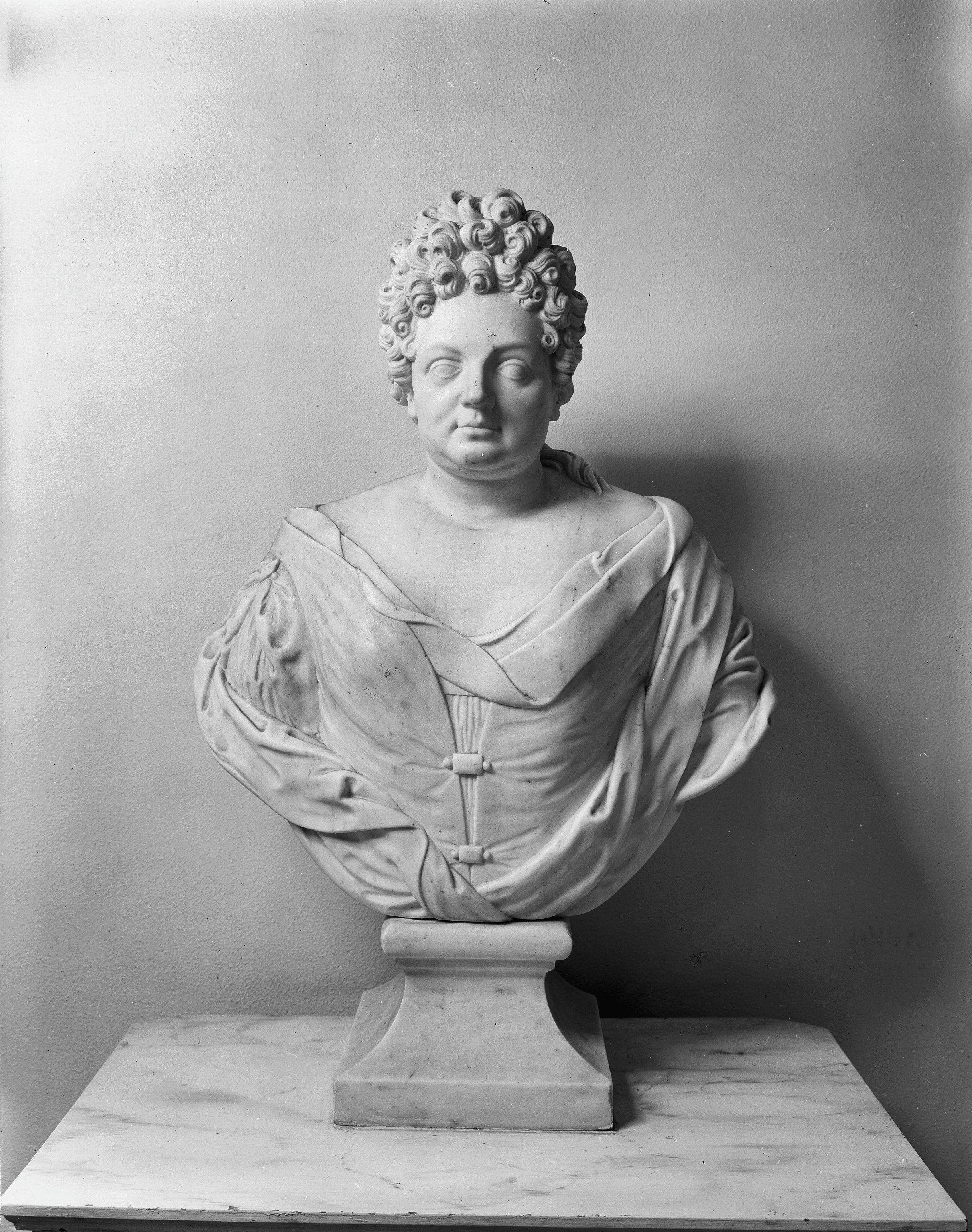 v.m. Raadhuis Paleis oude tekeningen en gravures: buste van S. Coymans This tag does not indicate the copyright status of the attached work. A normal copyright tag is still required. See Commons:Licensing.